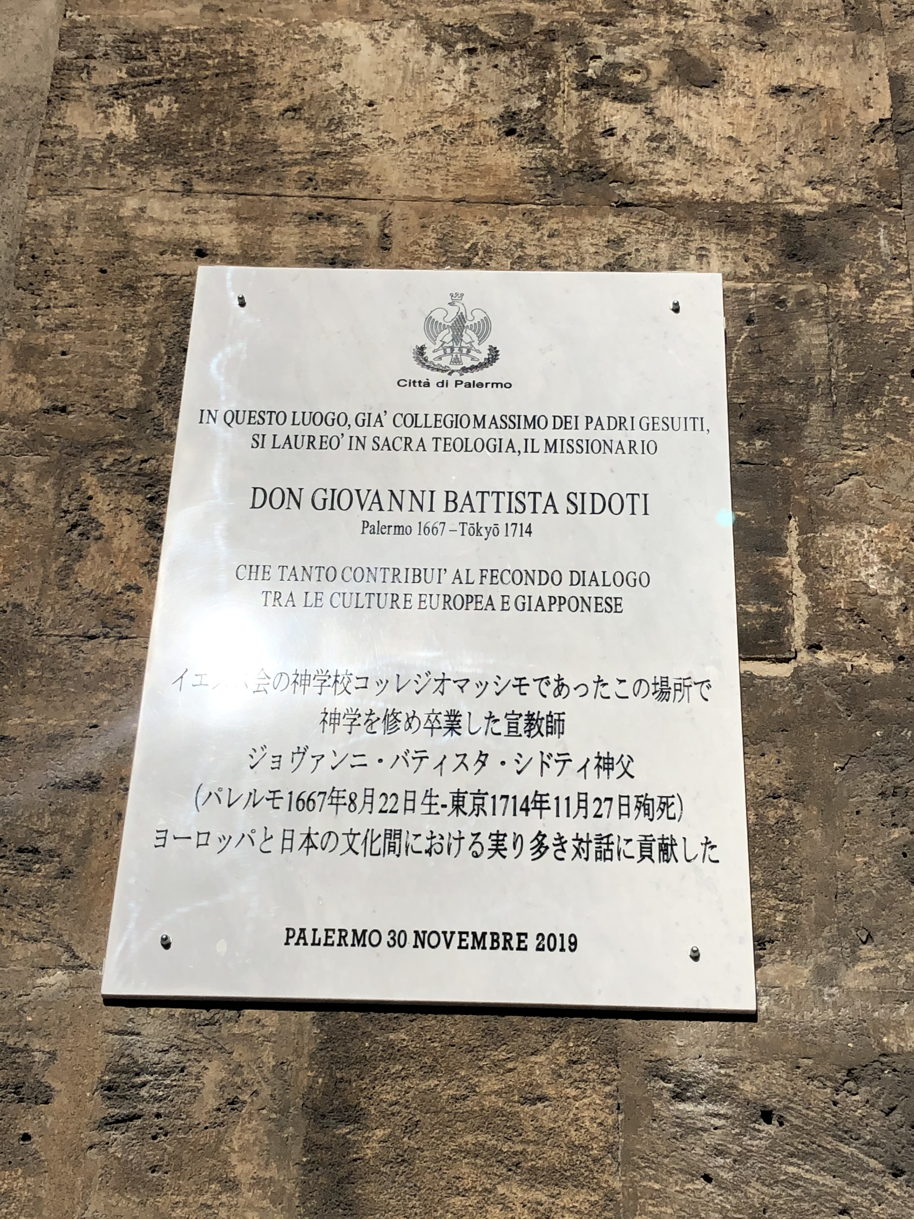 Targa italo-giapponese